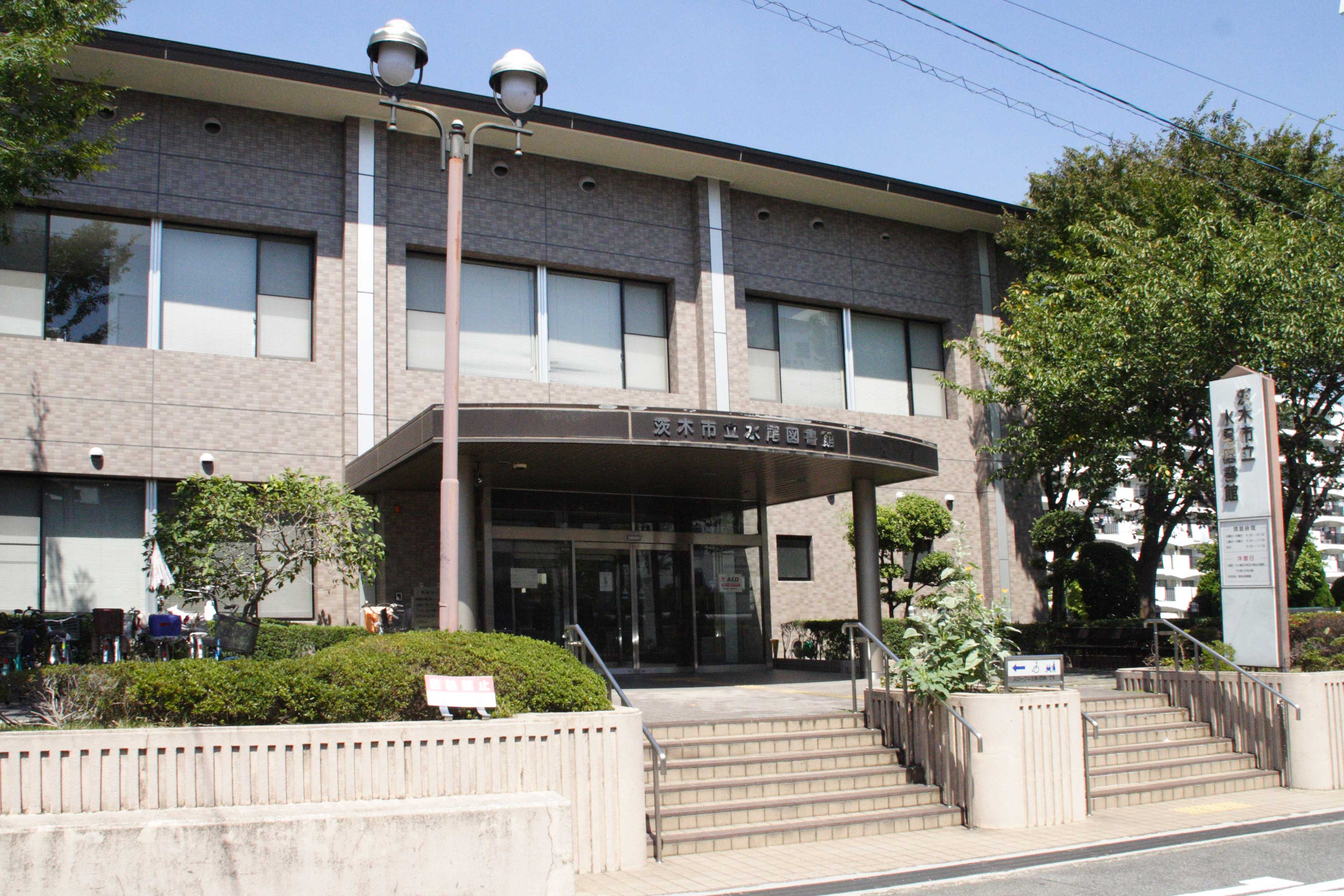 茨木市立水尾図書館